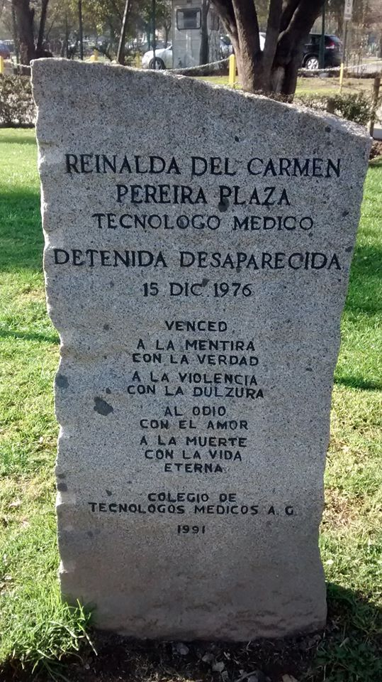 Monolito a la Detenida Desaparecida del Hospital Sótero del Río, Reinalda Pereira